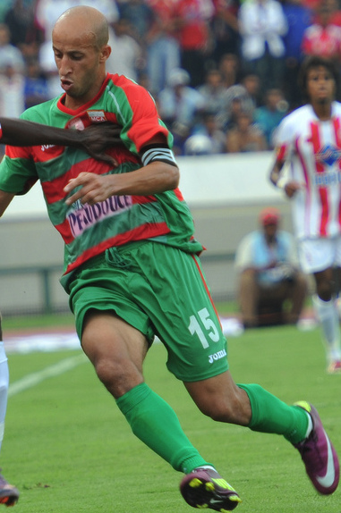 WAC vs MC Alger